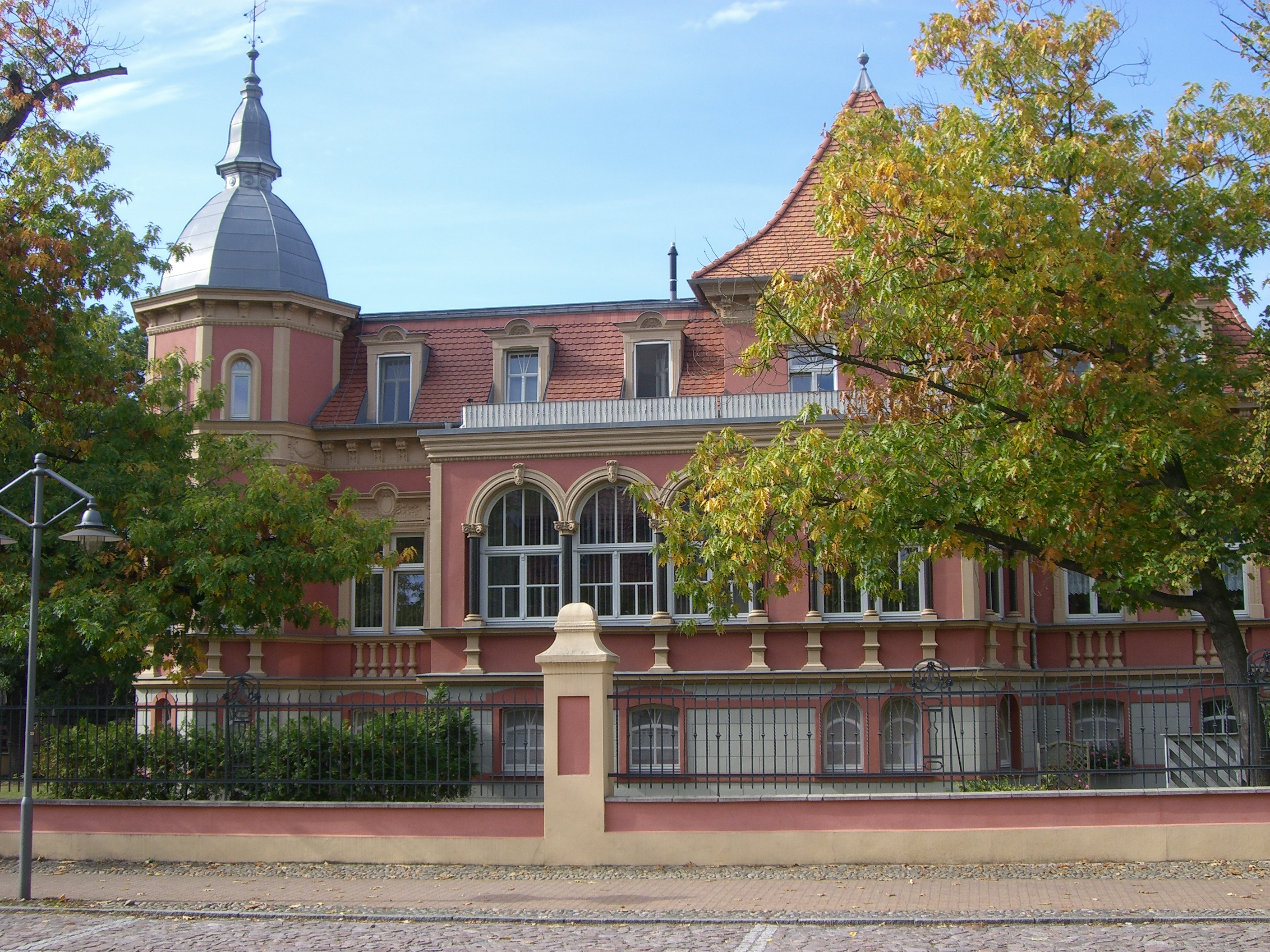 Fabrikantenvilla Bahnhofstraße Jessen